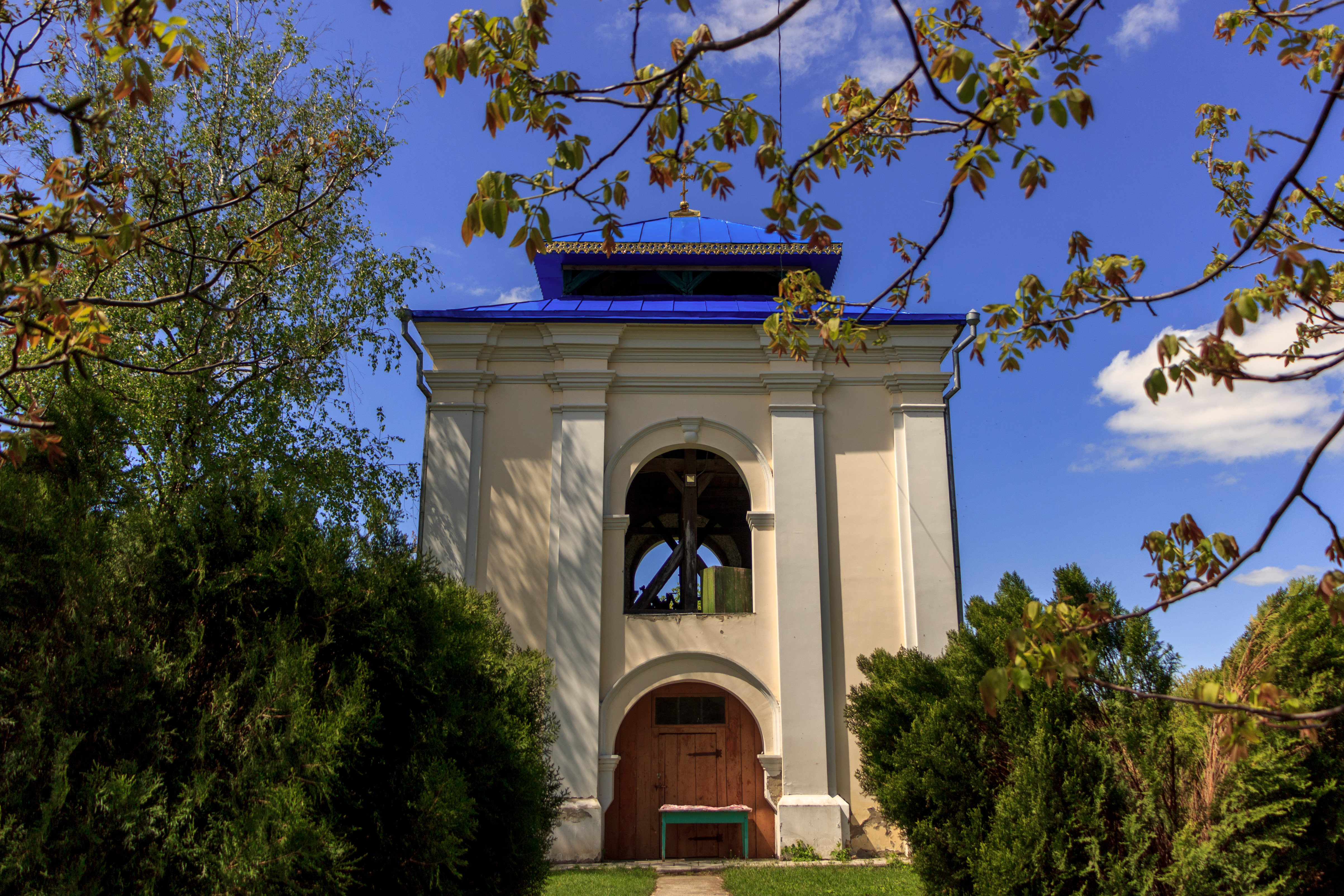 Дзвіниця